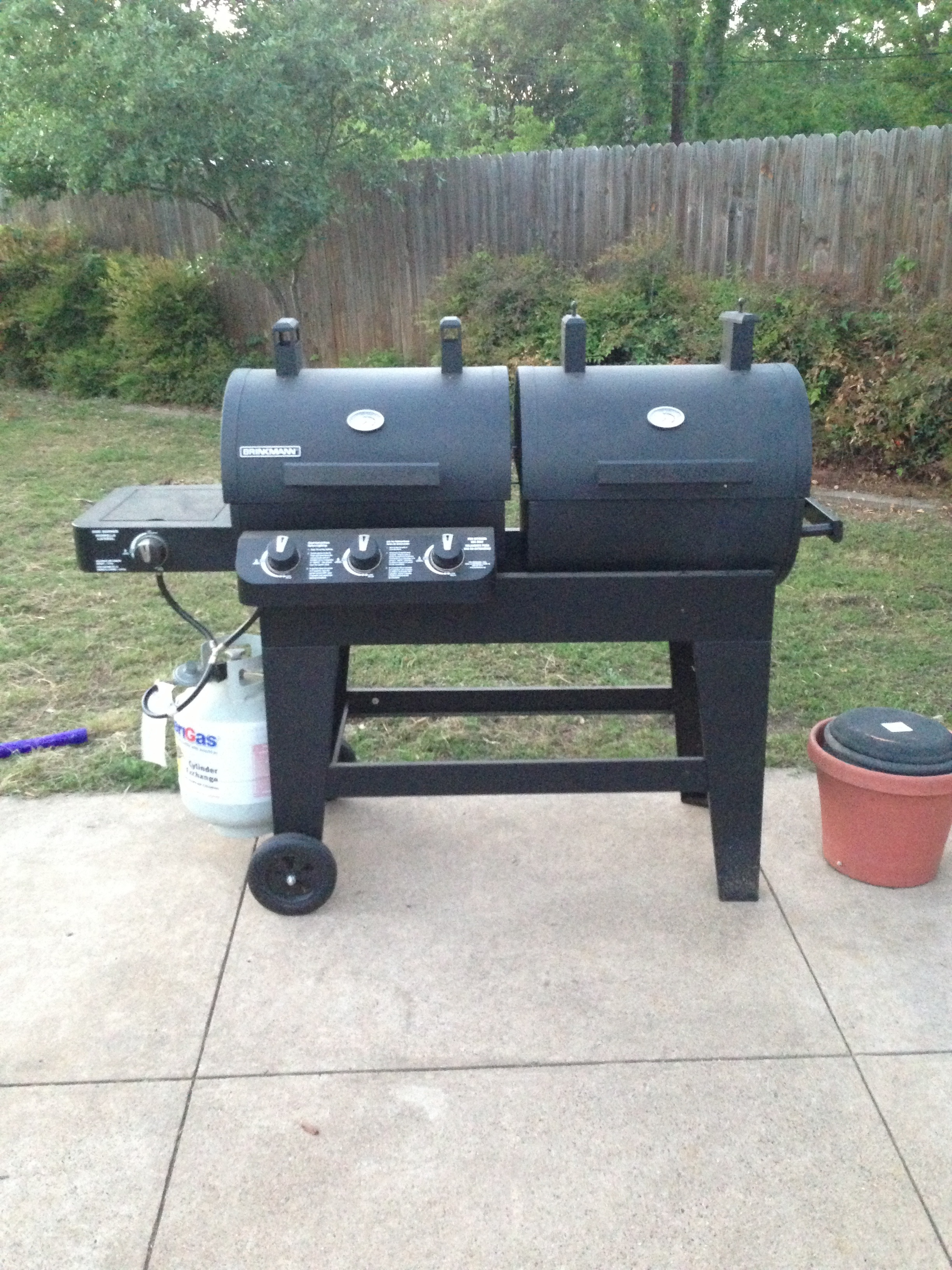 Hybrid BBQ grill